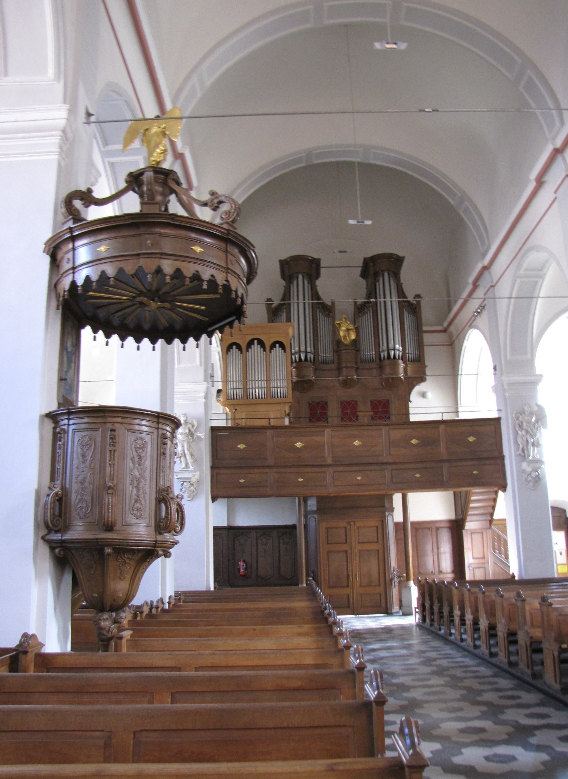 Eglise de l'Immaculée Conception d'Eupen